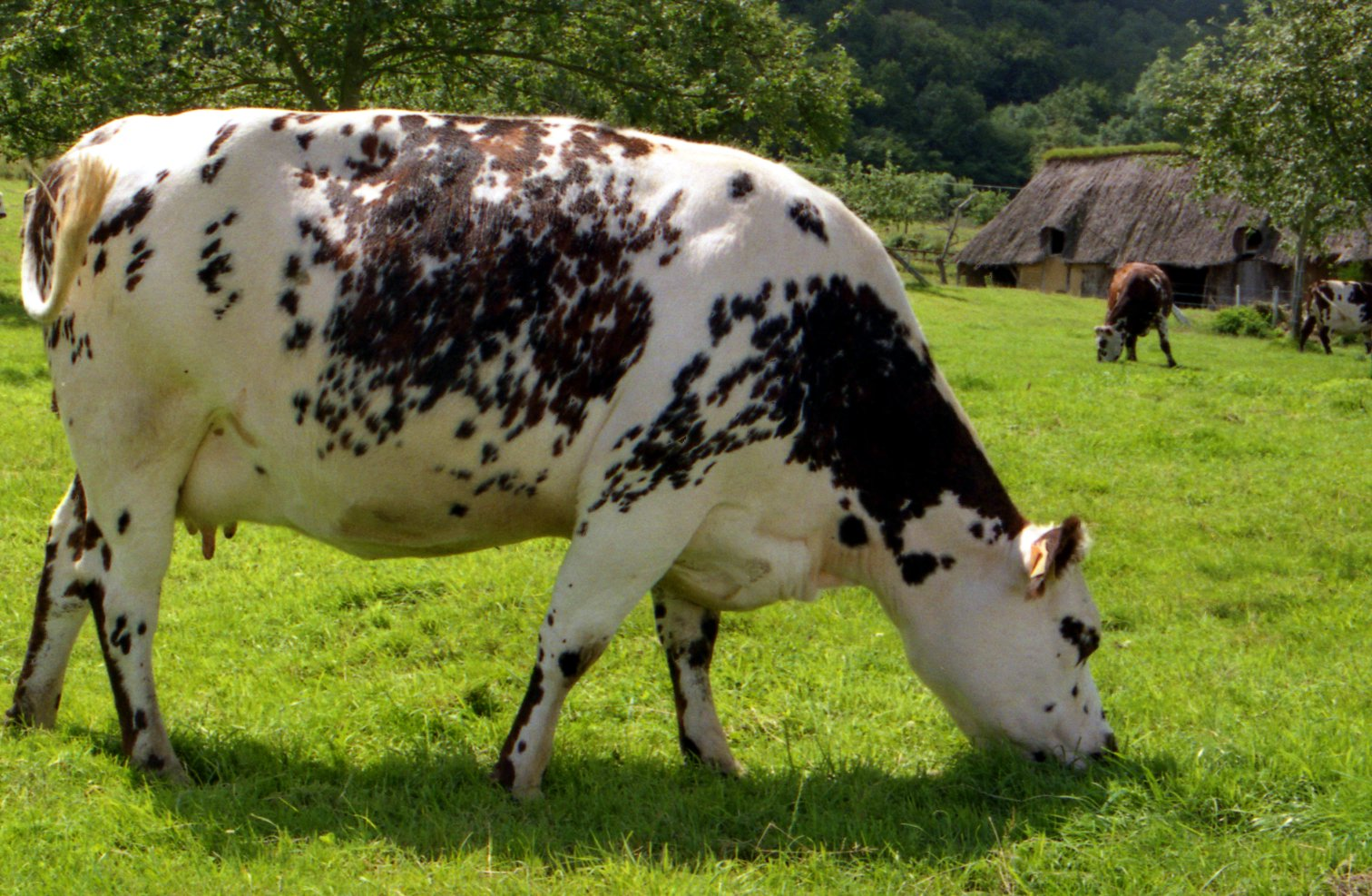 Une génisse de race normande au milieu des pommiers